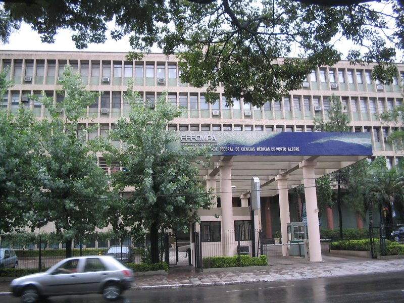 Sede UFCSPA (Universidade Federal de Ciências da Saúde de Porto Alegre) foto tirada quando a instituição ainda se chamava FFFCMPA (Fundação Faculdade Federal de Ciências Médicas de Porto Alegre)